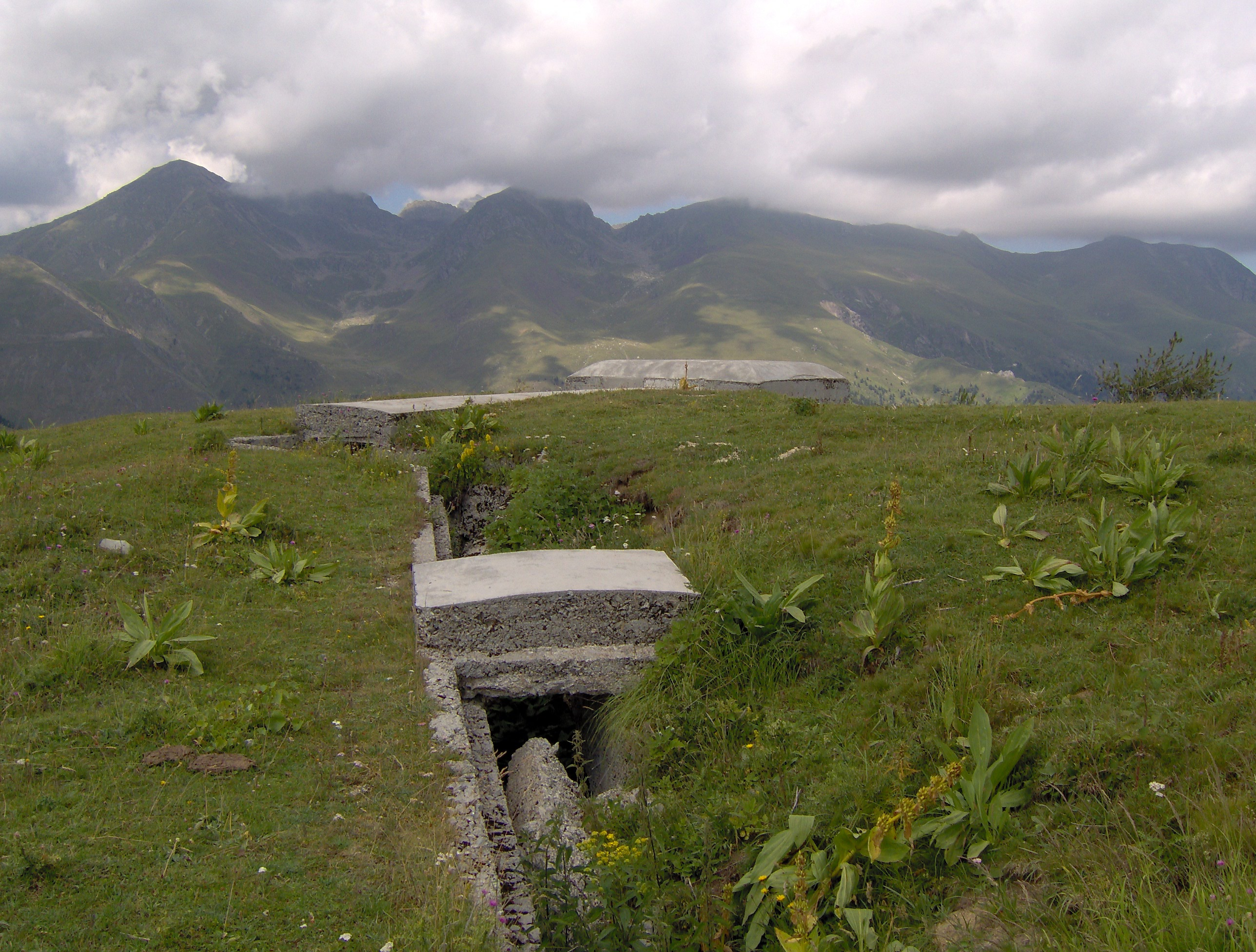 réseau de fortification (en ruines) de Plan Caval (1932 m) photo prise par G.Bertothy été 2005